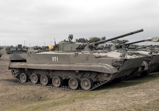 БМП-3 Вооруженных сил Украины